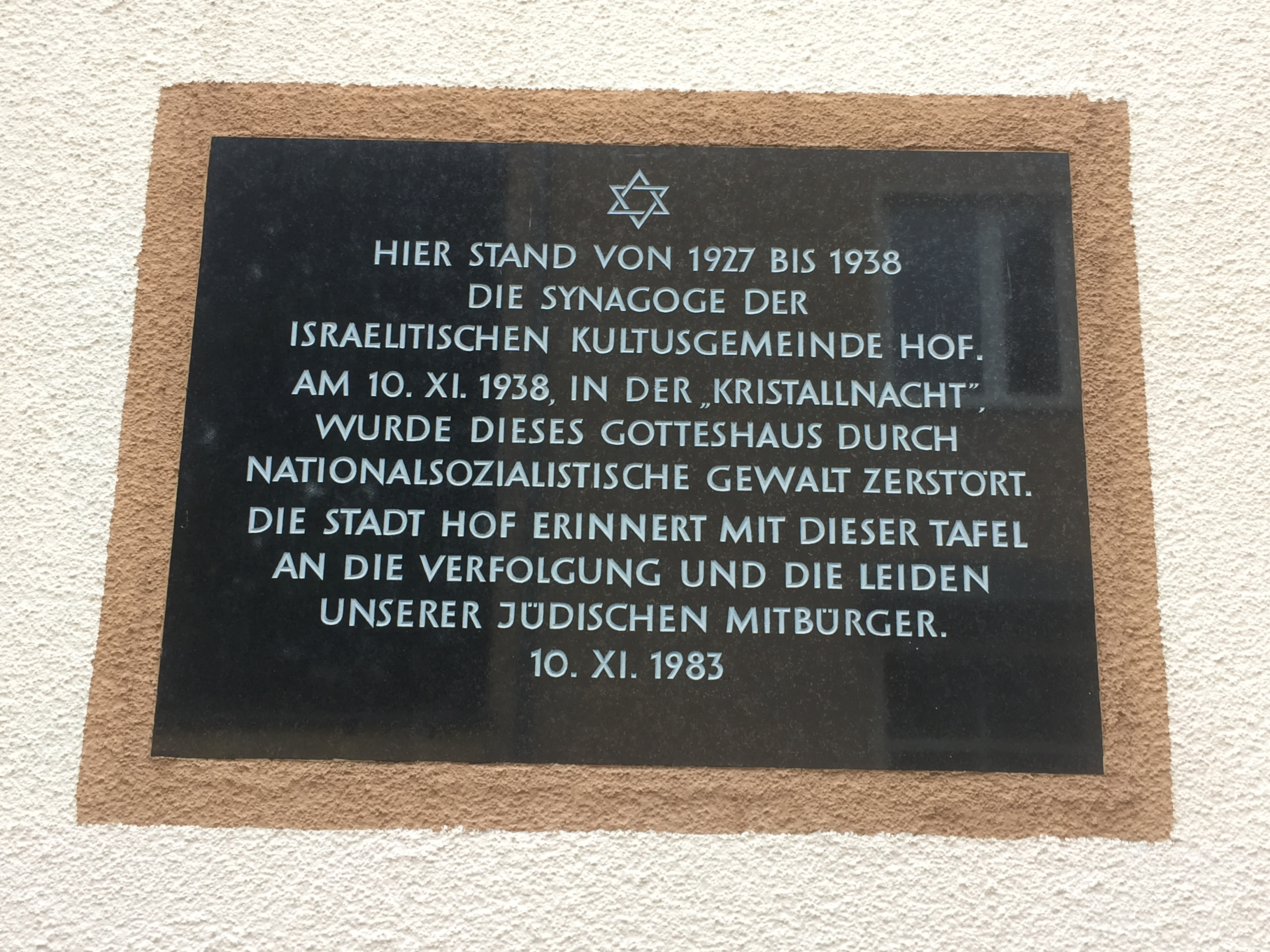 Gedenktafel für die 1938 zerstörte Synagoge in Hof